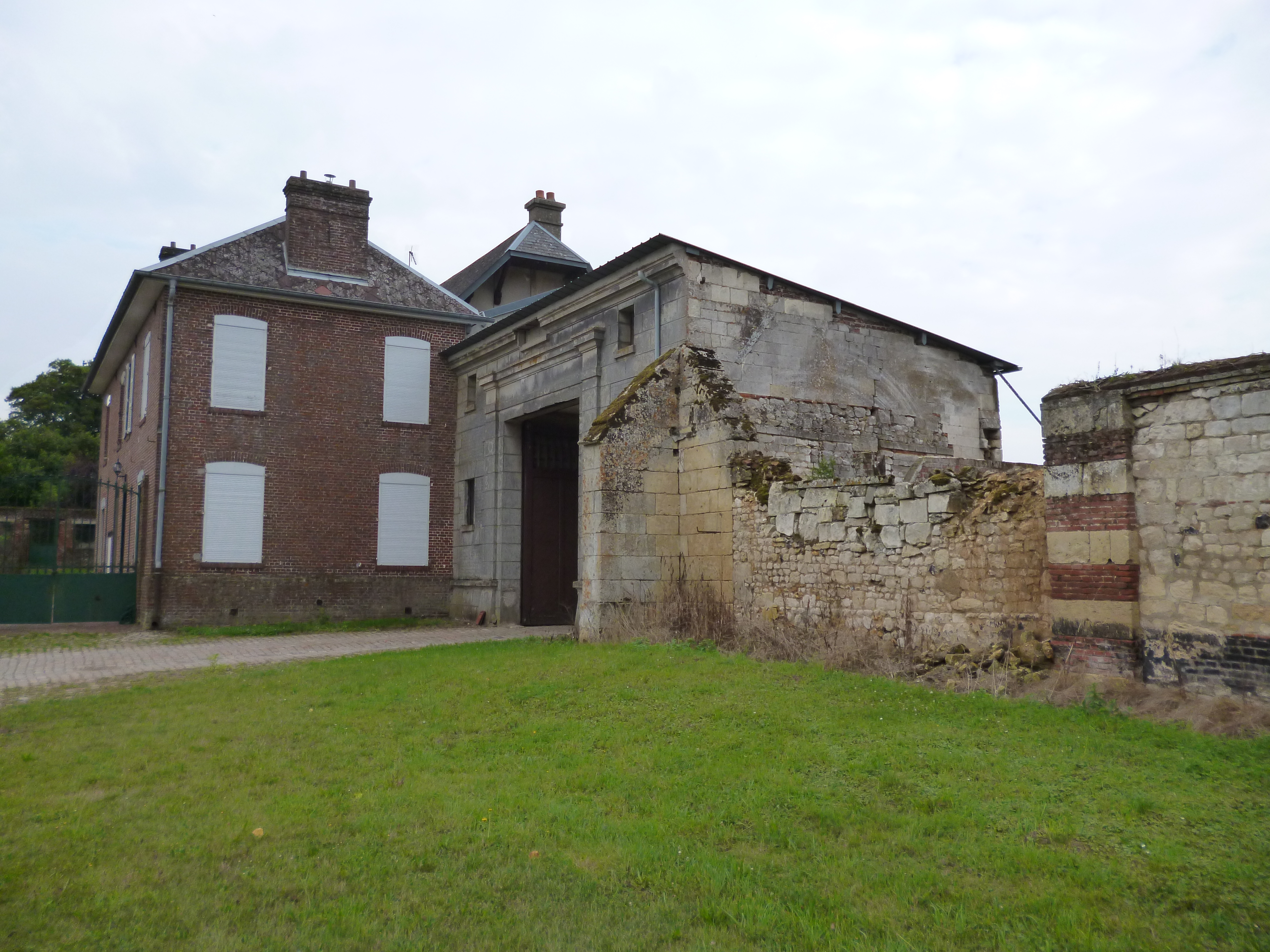 Ferme de Troussures, située sur la commune de Sainte-Eusoye (Oise, Picardie). Inscrite au MH 1989.